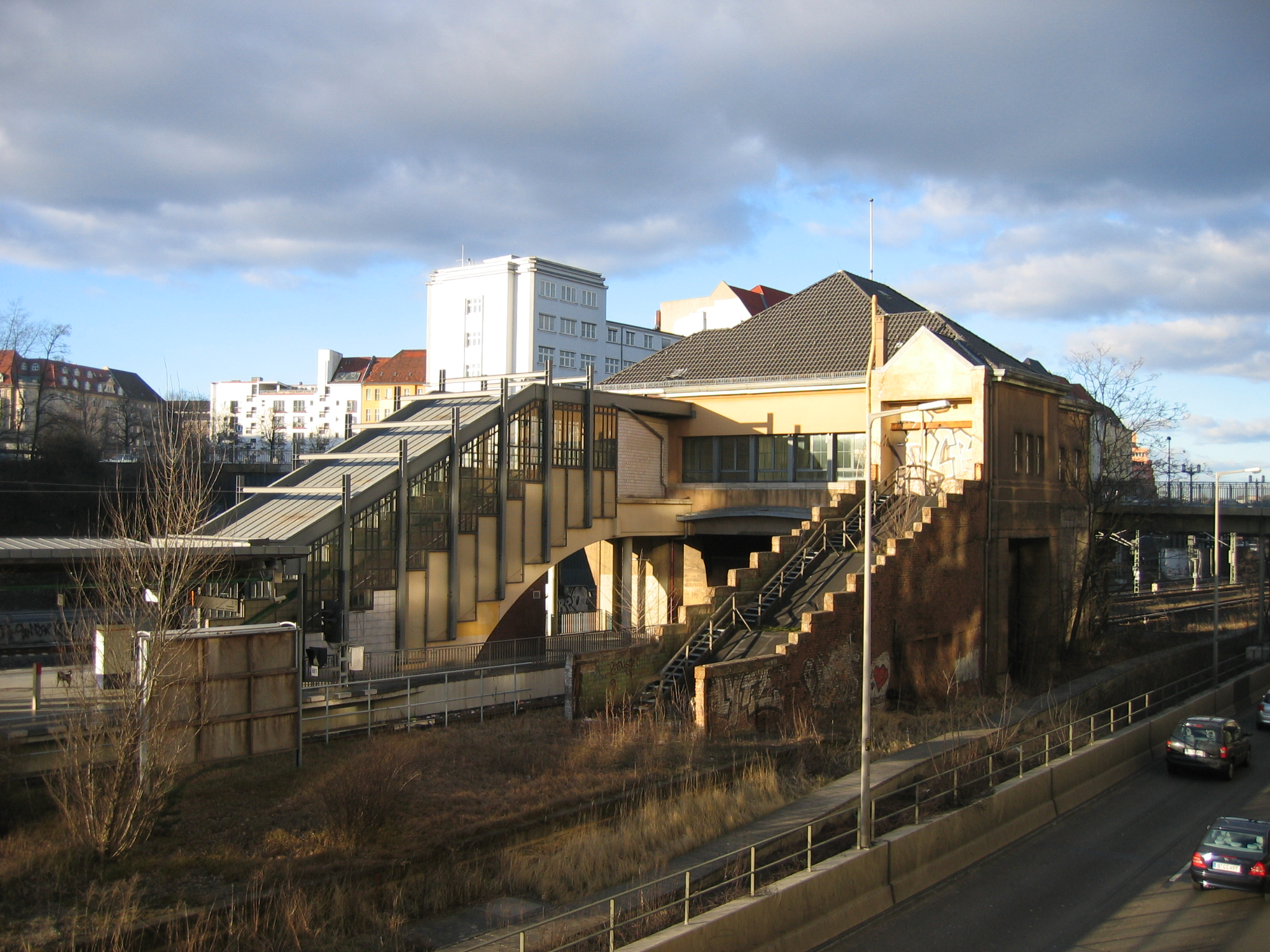 S-Bahnhof Berlin Messe Nord/ICC, Bahnsteige